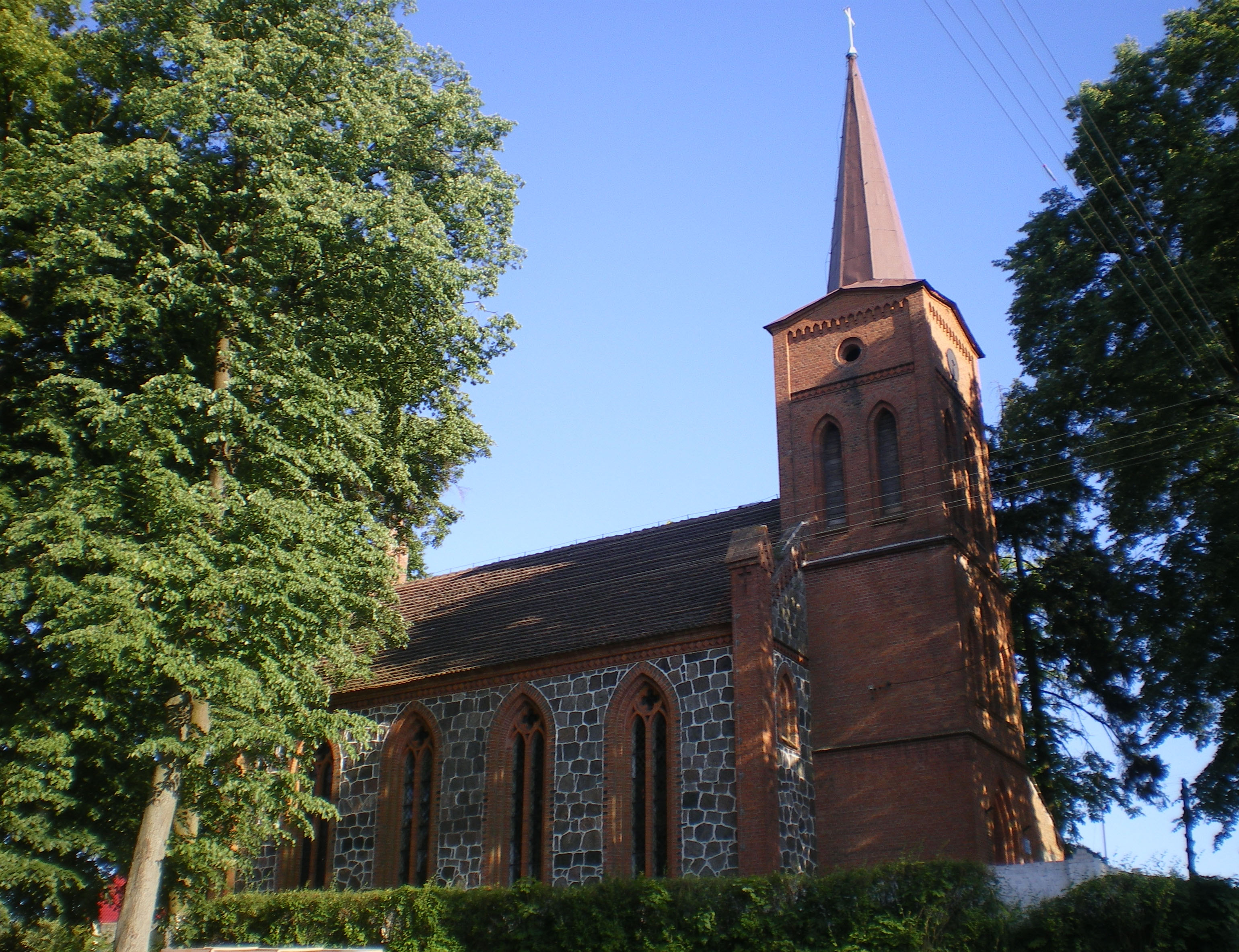 Kołki - rzymskokatolicki kościół filialny p.w. św. Teresy od Dzieciatka Jezus, 1870